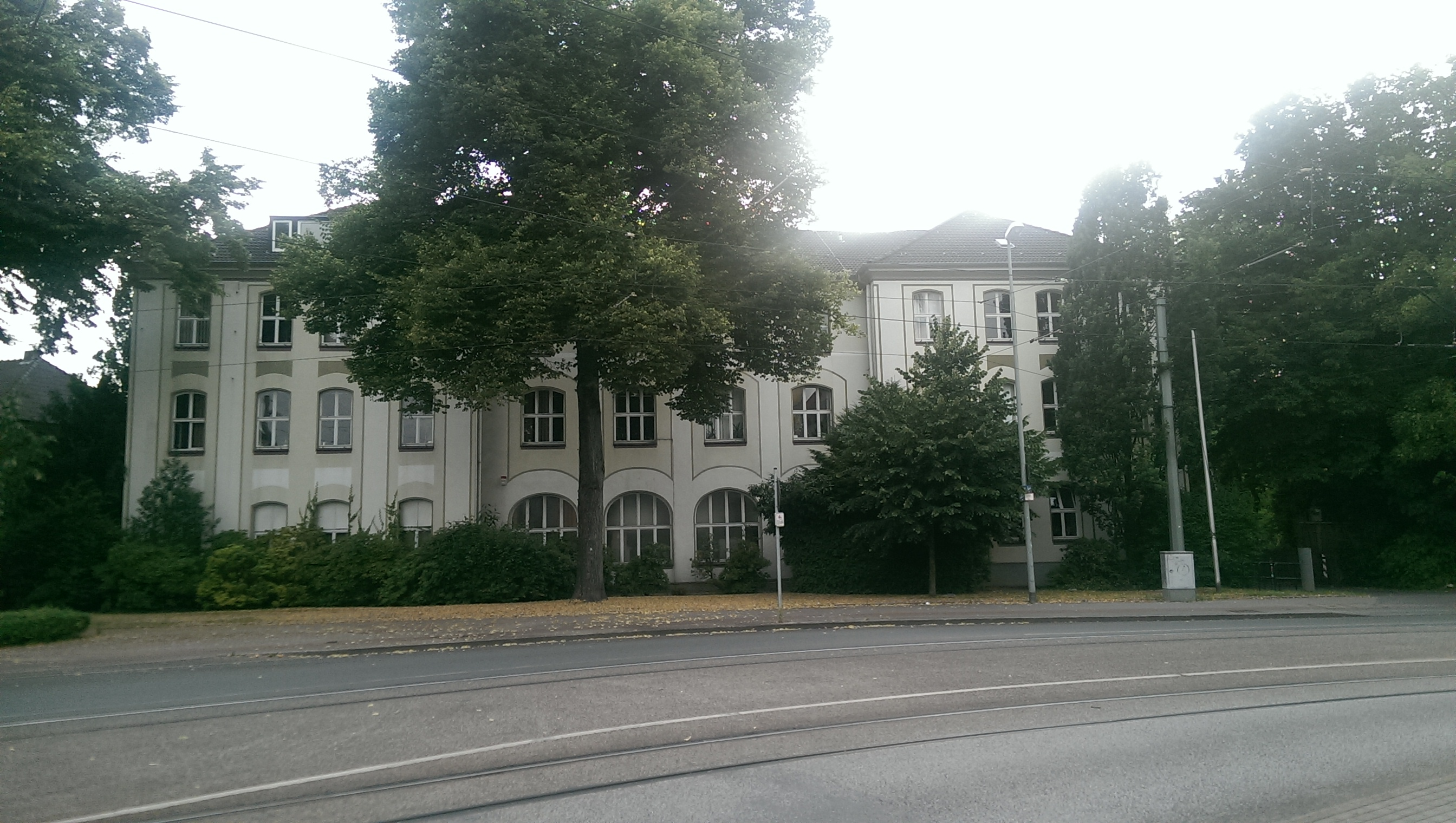 Ehemalige evangelische Lutherschule und heutiges Vermessungs- und Katasteramt Wanne-Eickel, bis um Zusammenschluss von Herne und Wanne-Eickel auch Verwaltungsgebäude und darin Sitzungssaal der Stadt Wanne-Eickel